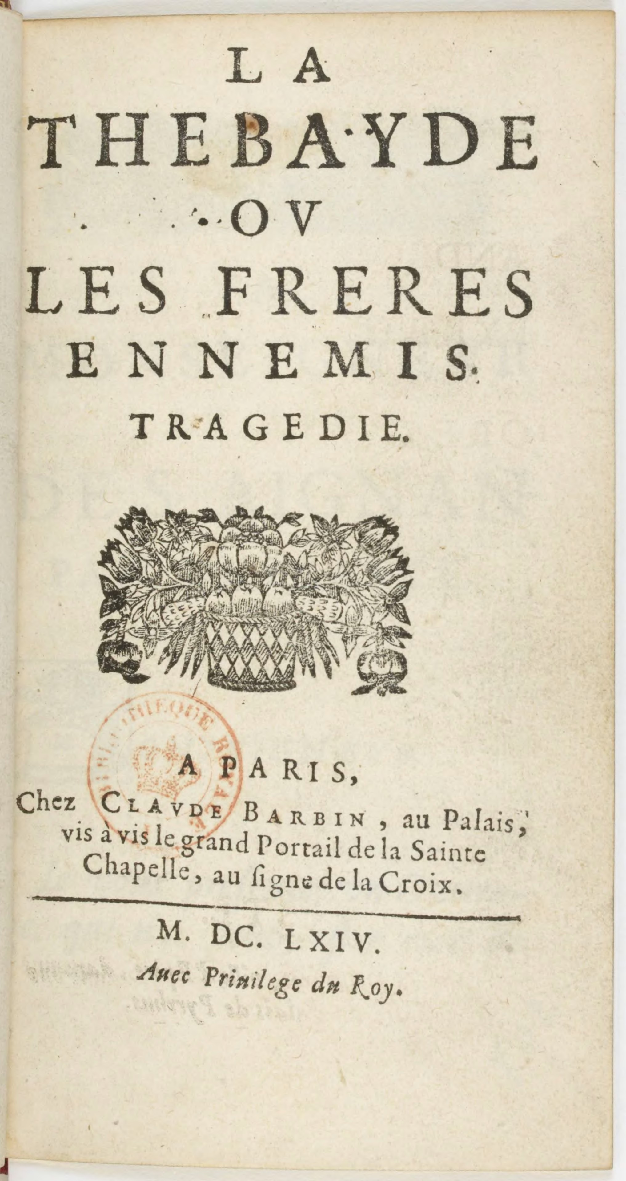 Jean Racine, La ThébaÏde, édition originale de 1664